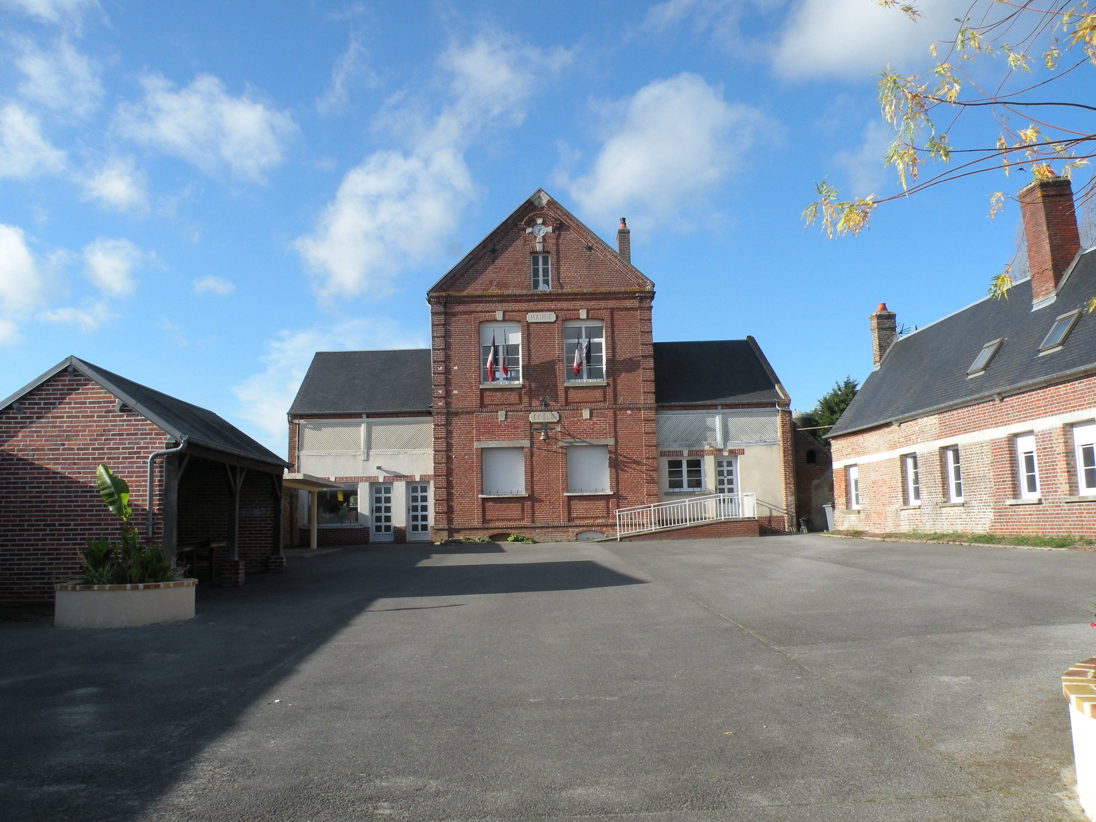 Oroër